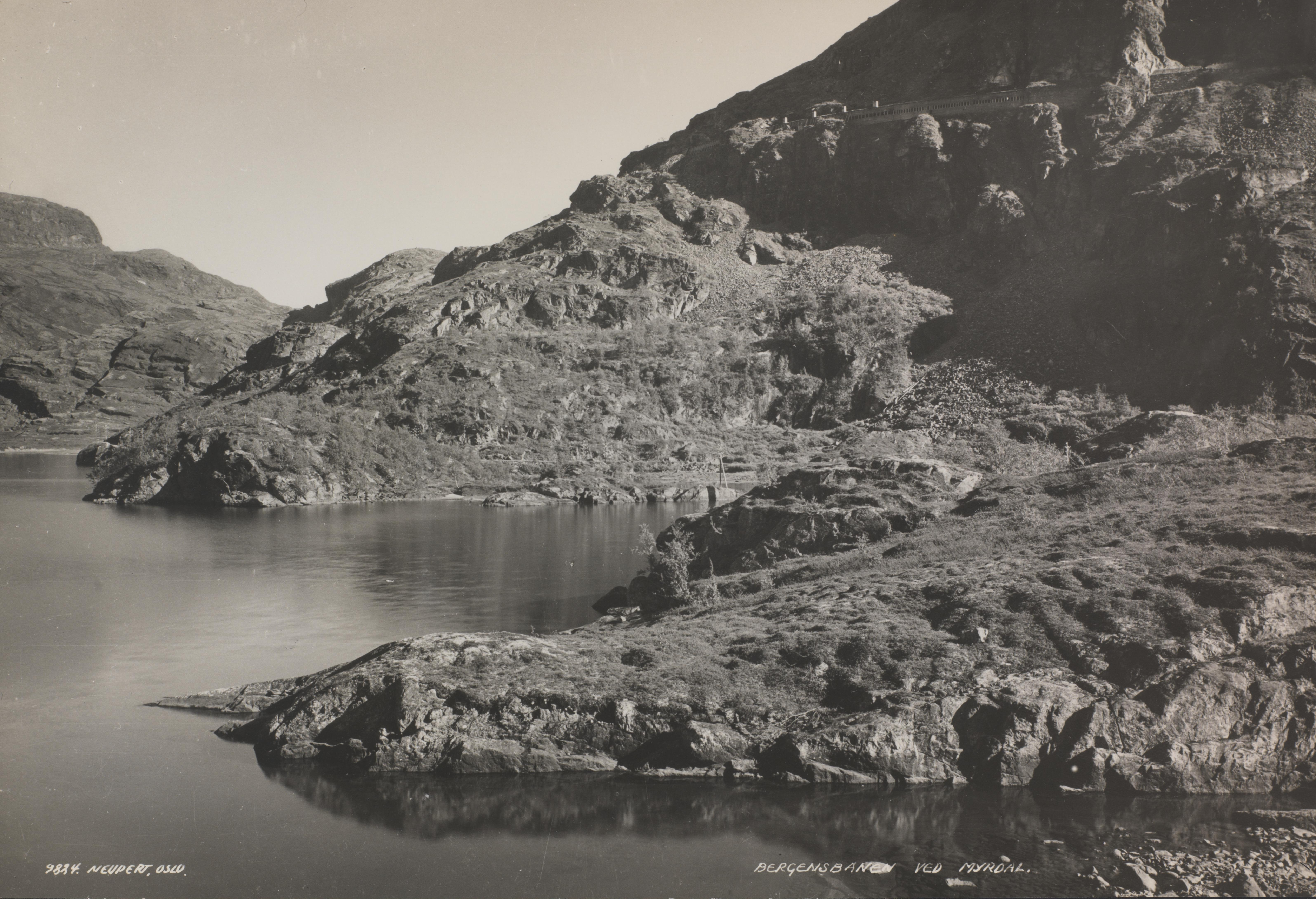 Bildet er hentet fra Nasjonalbibliotekets bildesamling Myrdal, Aurland, Sogn og Fjordane